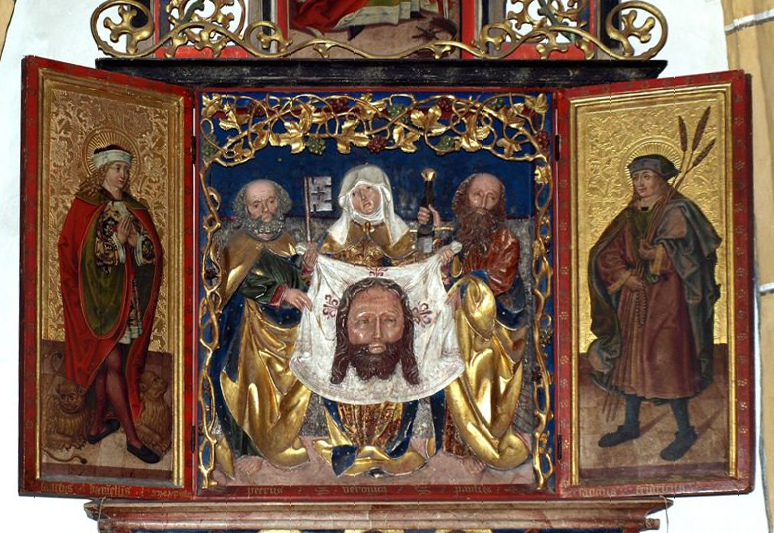 Heiligenblut Sankt Vinzenz Kirke (Østrig) i Danmark. Veronika-alter